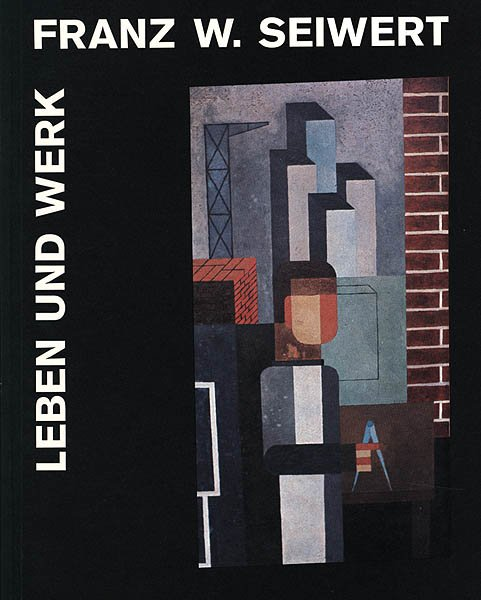 Buchumschlag zu „Franz W. Seiwert. Leben und Werk“